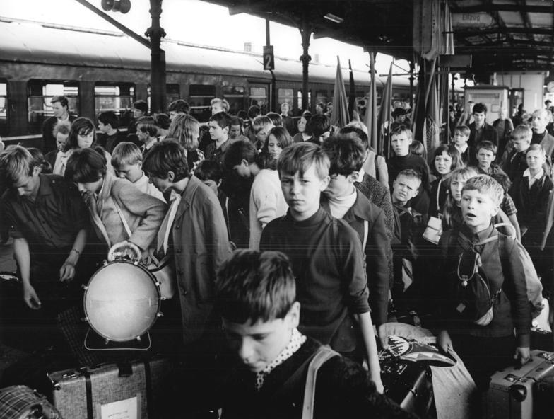 Zentralbild-Mittelstädt-19-7-70-ma-Berlin: III. Kinder- und Jugendspartakiade der DDR- Auf dem Bahnhof Berlin-Schöneweide trafen am Mittag, mit einem Sonderzug aus Bad Schmiedeberg kommend, die Spielleute und Fanfarenzüge ein.